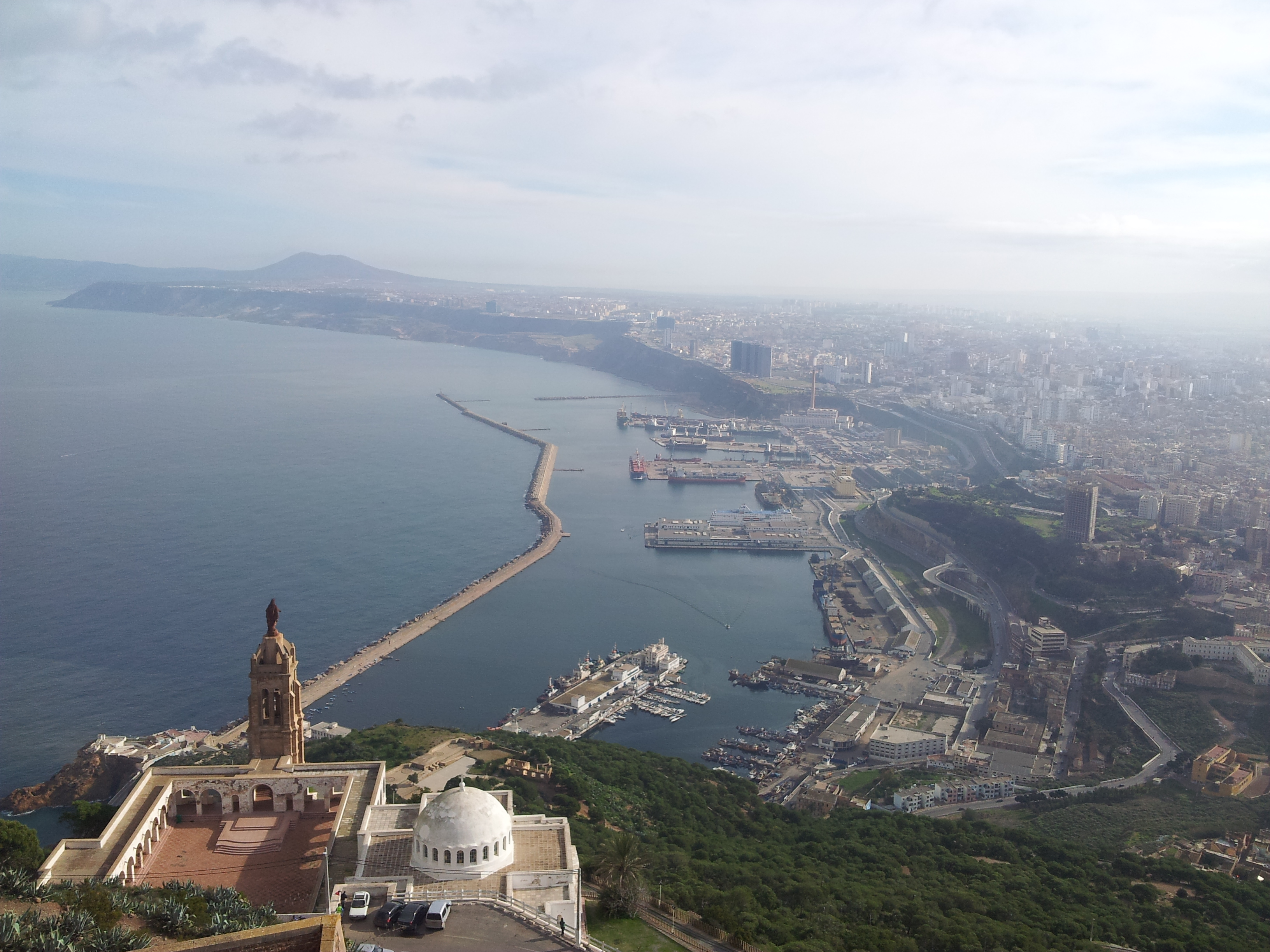 ORAN (Algérie) : La chapelle de Santa Cruz, la statut de la Vierge Notre-Dame du Salut et le port.